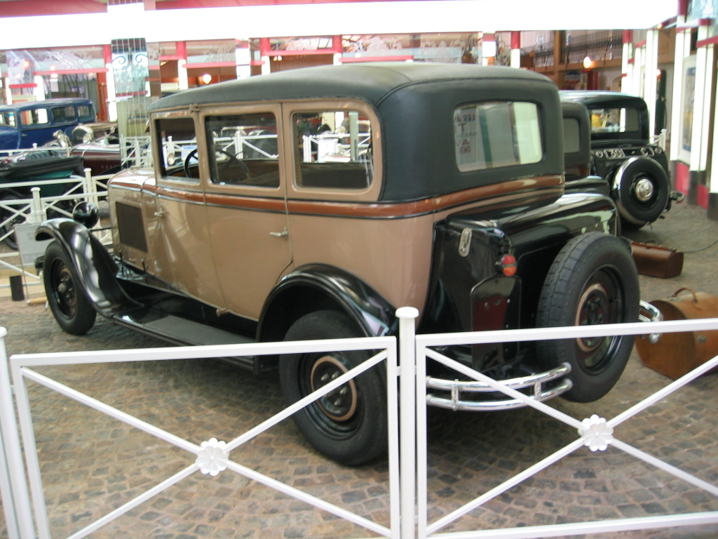 Peugeot Type 183 - Musée Peugeot Sochaux